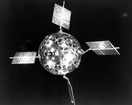 Pioneer Lunar Orbiter Spacecraft